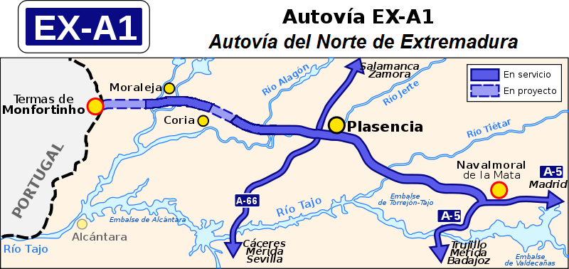 Autovía EX-A1 trazado